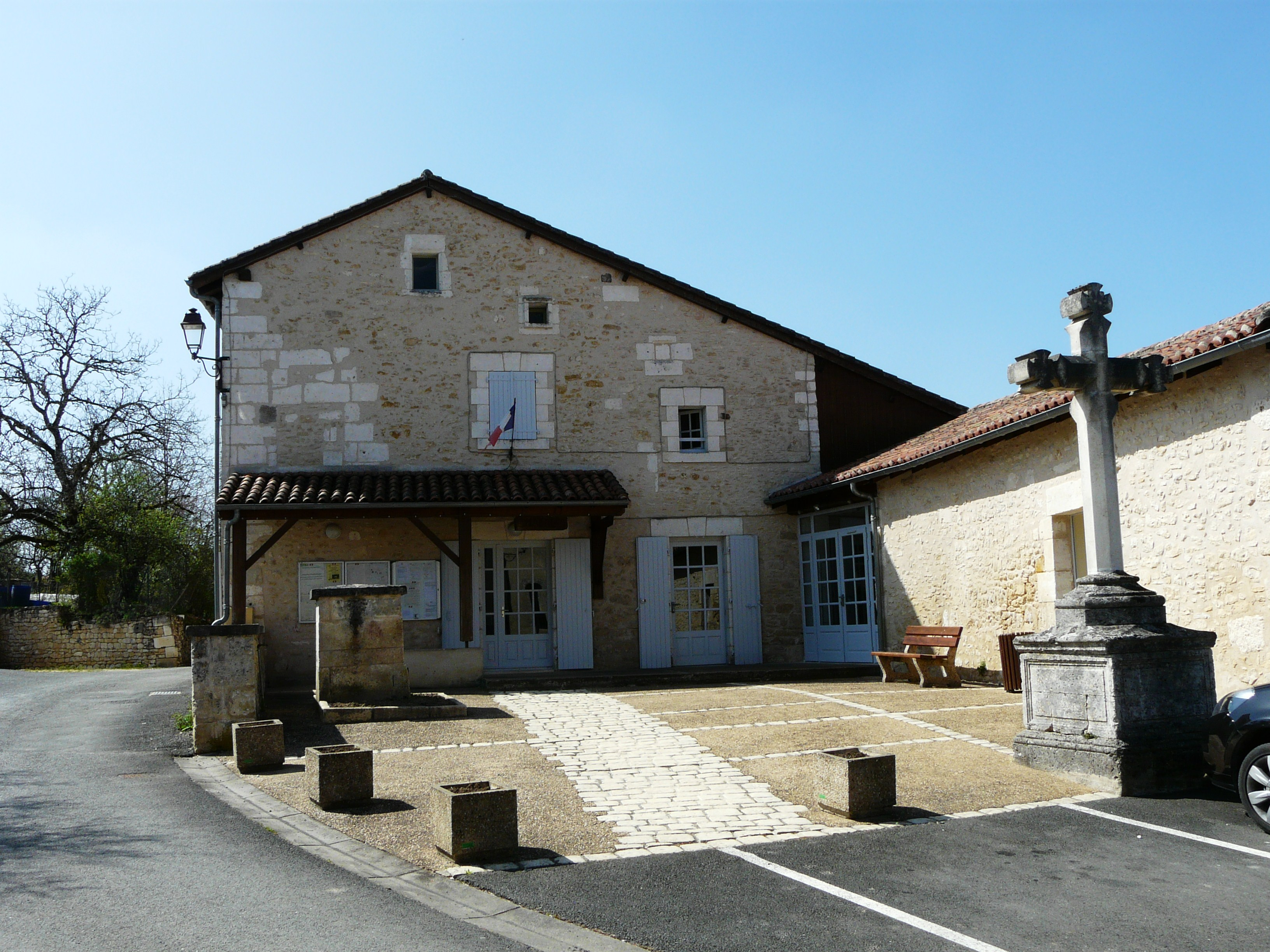 La mairie de Saint-Pancrace, Dordogne, France.